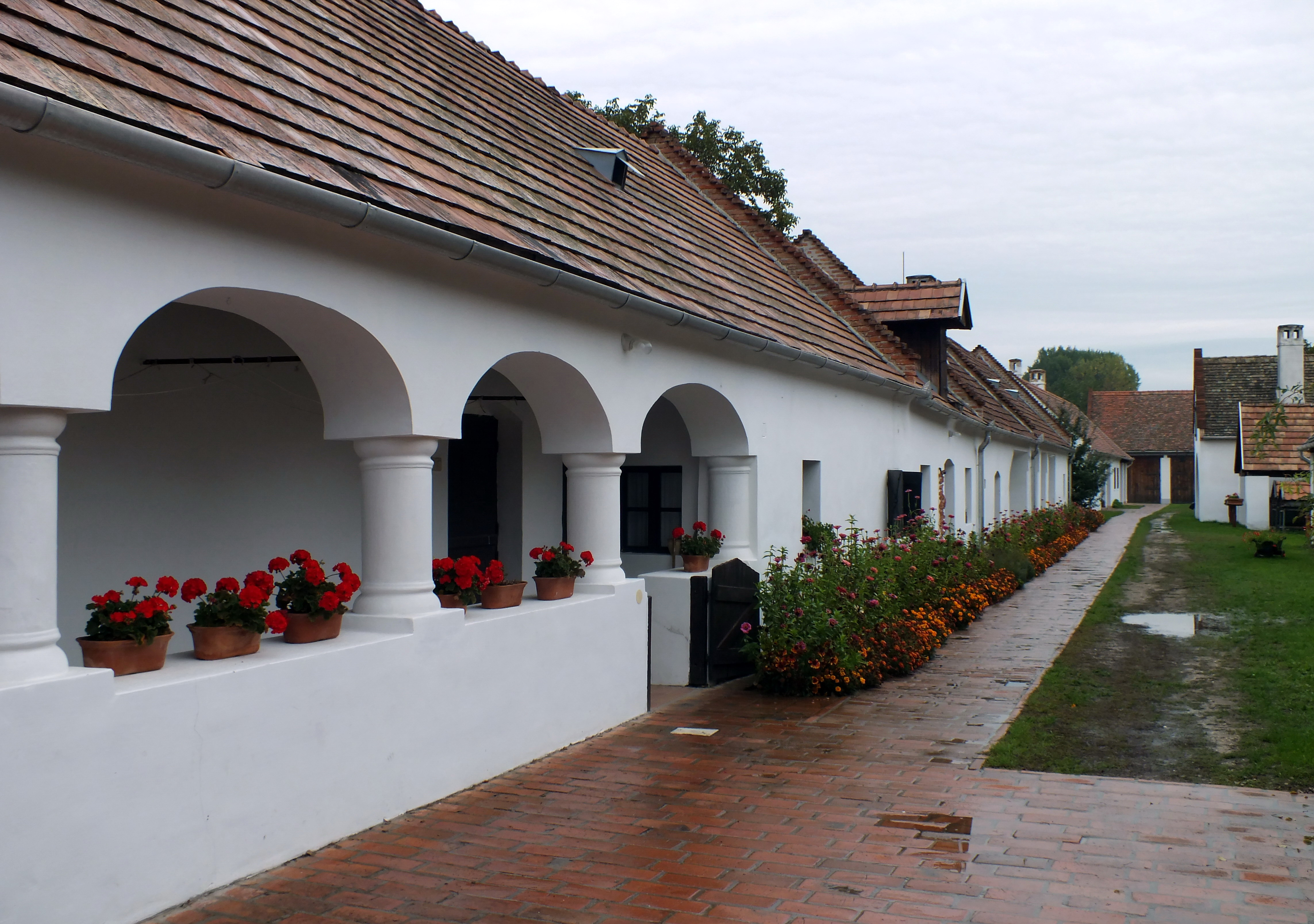 Lakóház; Tájház, azonosító 9988 (törzsszám 6709). - Veszprém megye, Magyarpolány, Petőfi Sándor u. 4. This is a photo of a monument in Hungary. Identifier: 9988